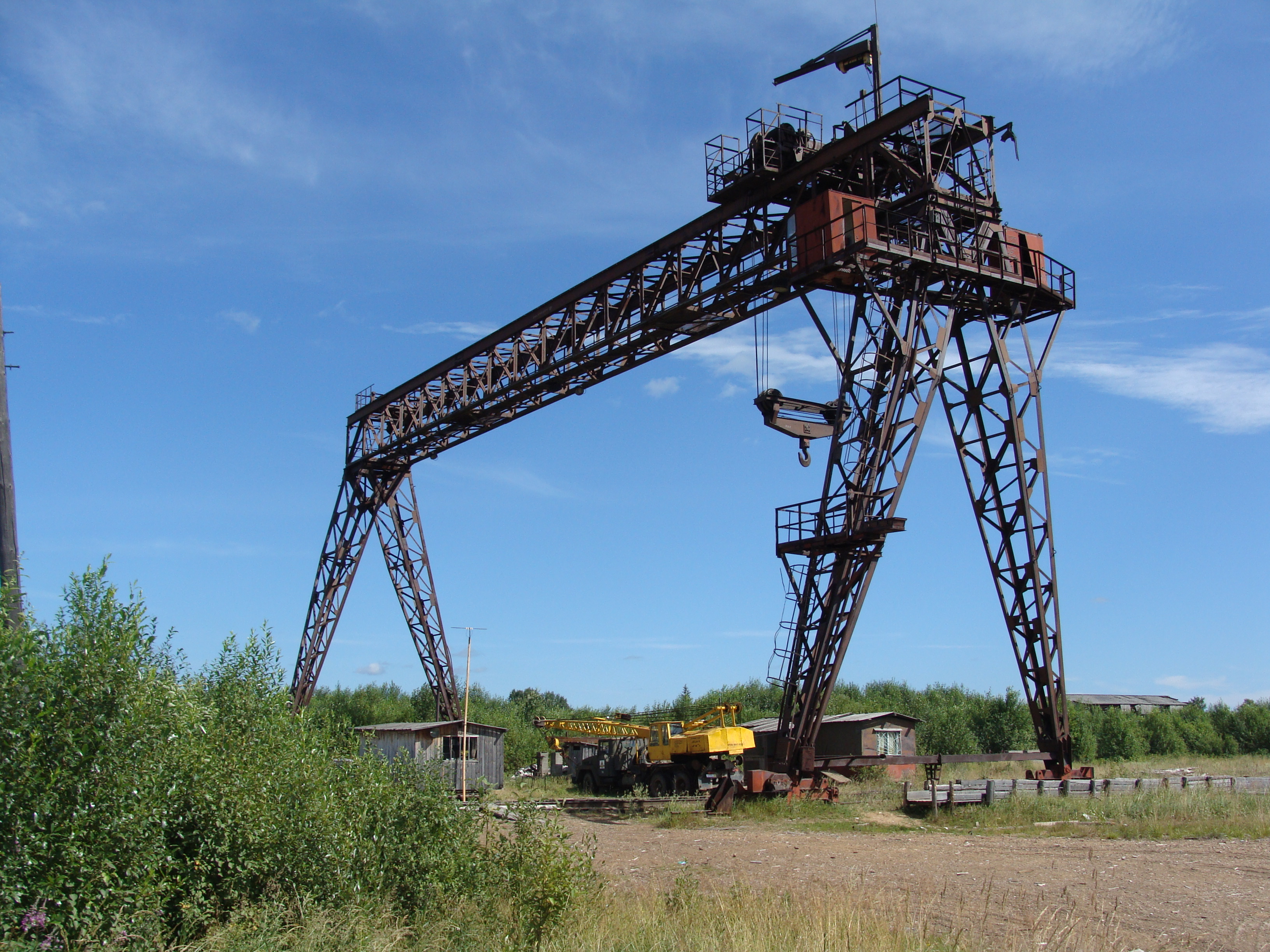 п. Черемушский Котласского района Архангельской области